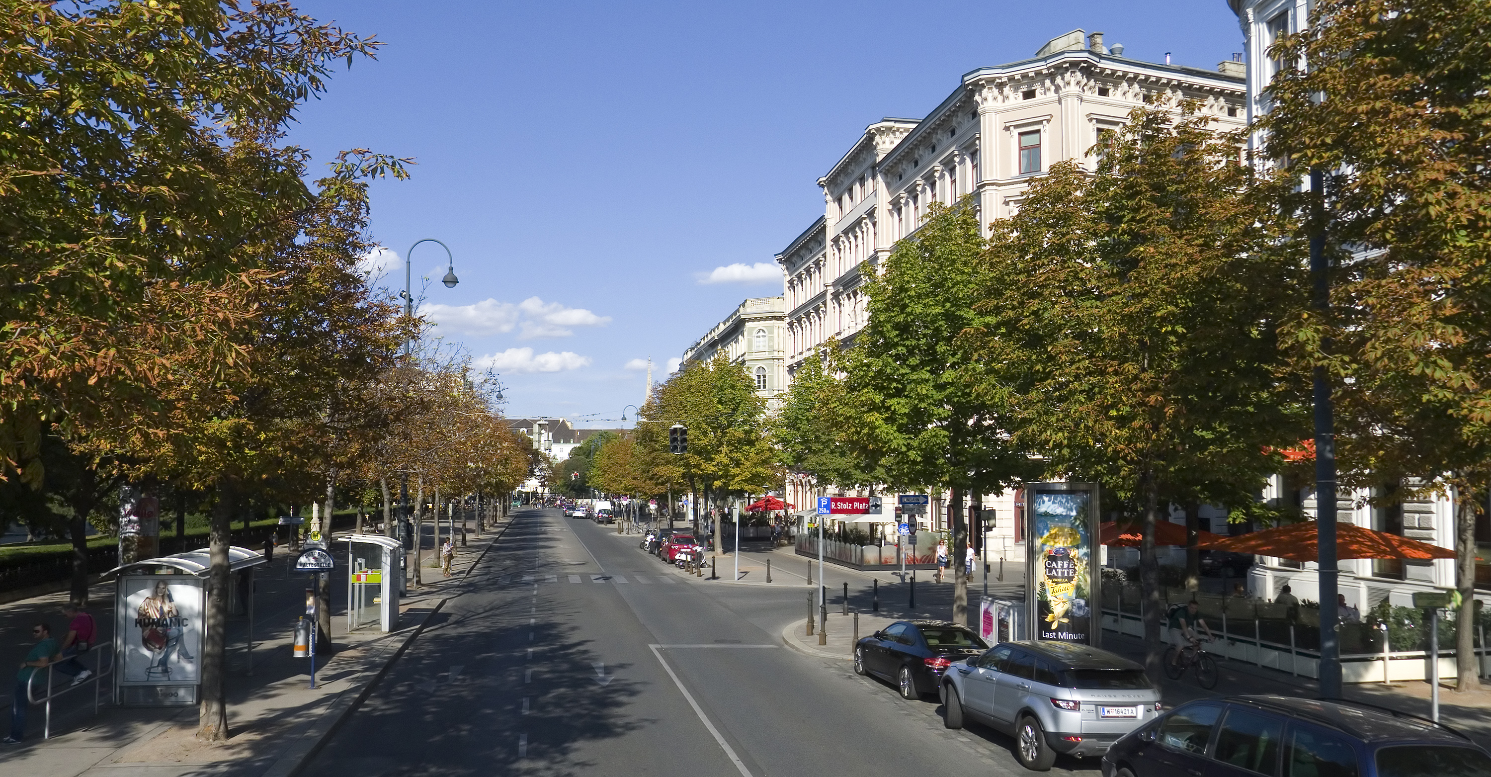 Babenbergerstraße in Wien 1 bei Nr. 9 Richtung Nordosten.